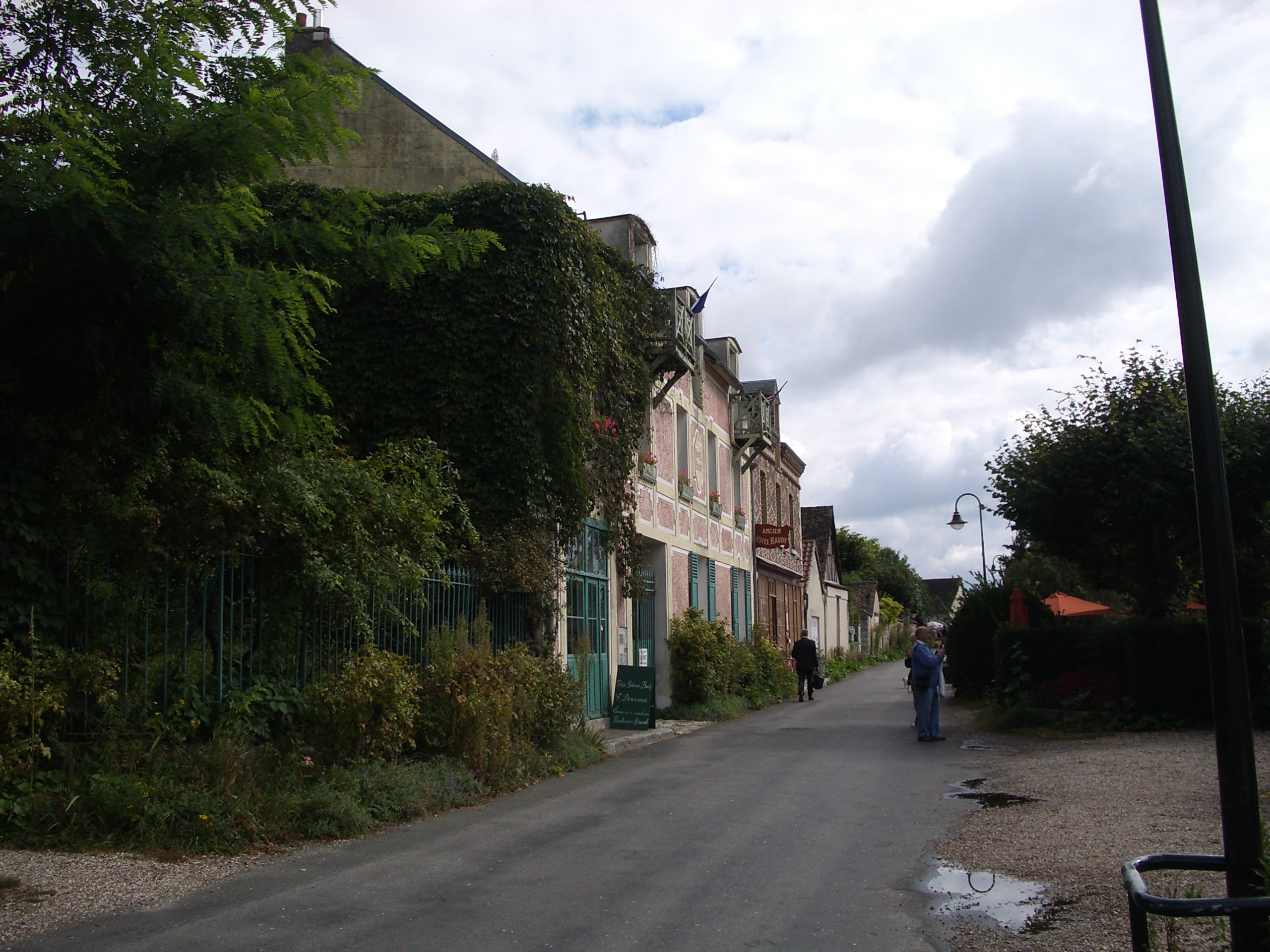 L'hôtel Baudy à Giverny (Eure)